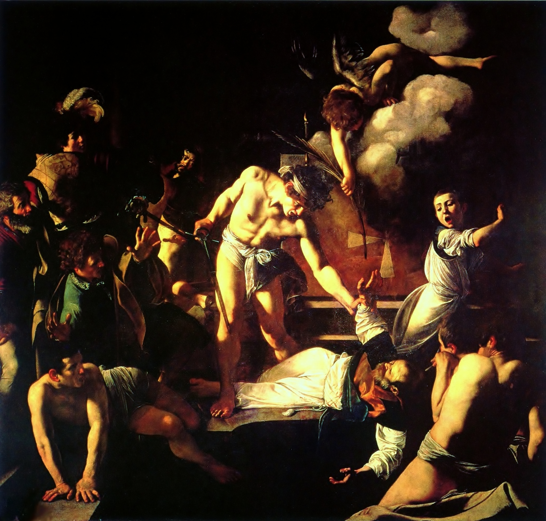 Martirio di San Matteo.